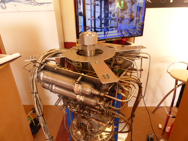 Motor, detalle, PLD Space